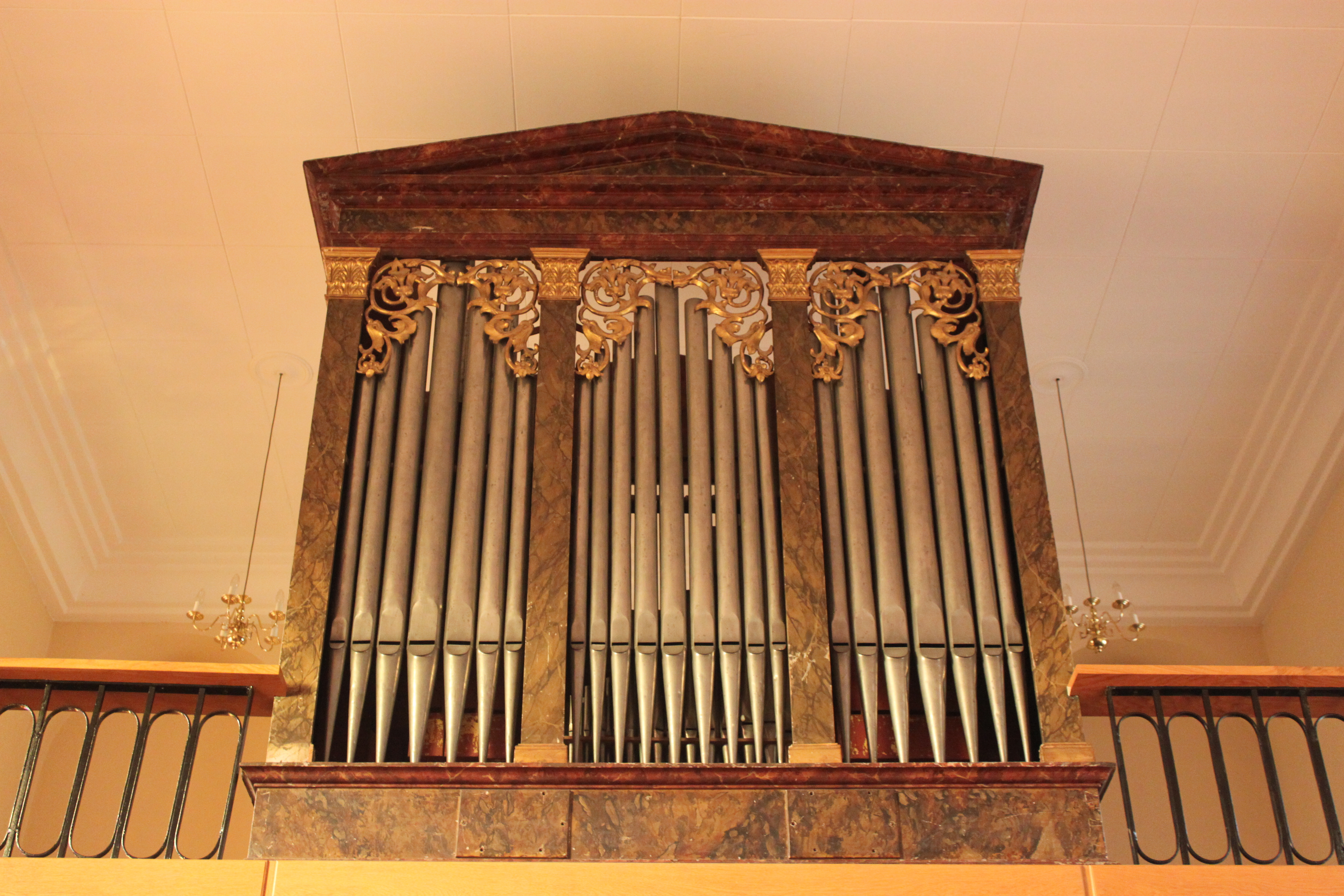 Prospekt der Orgel der Filialkirche Kleinrötz